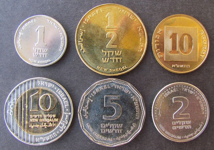 המטבעות החדשים של ישראל